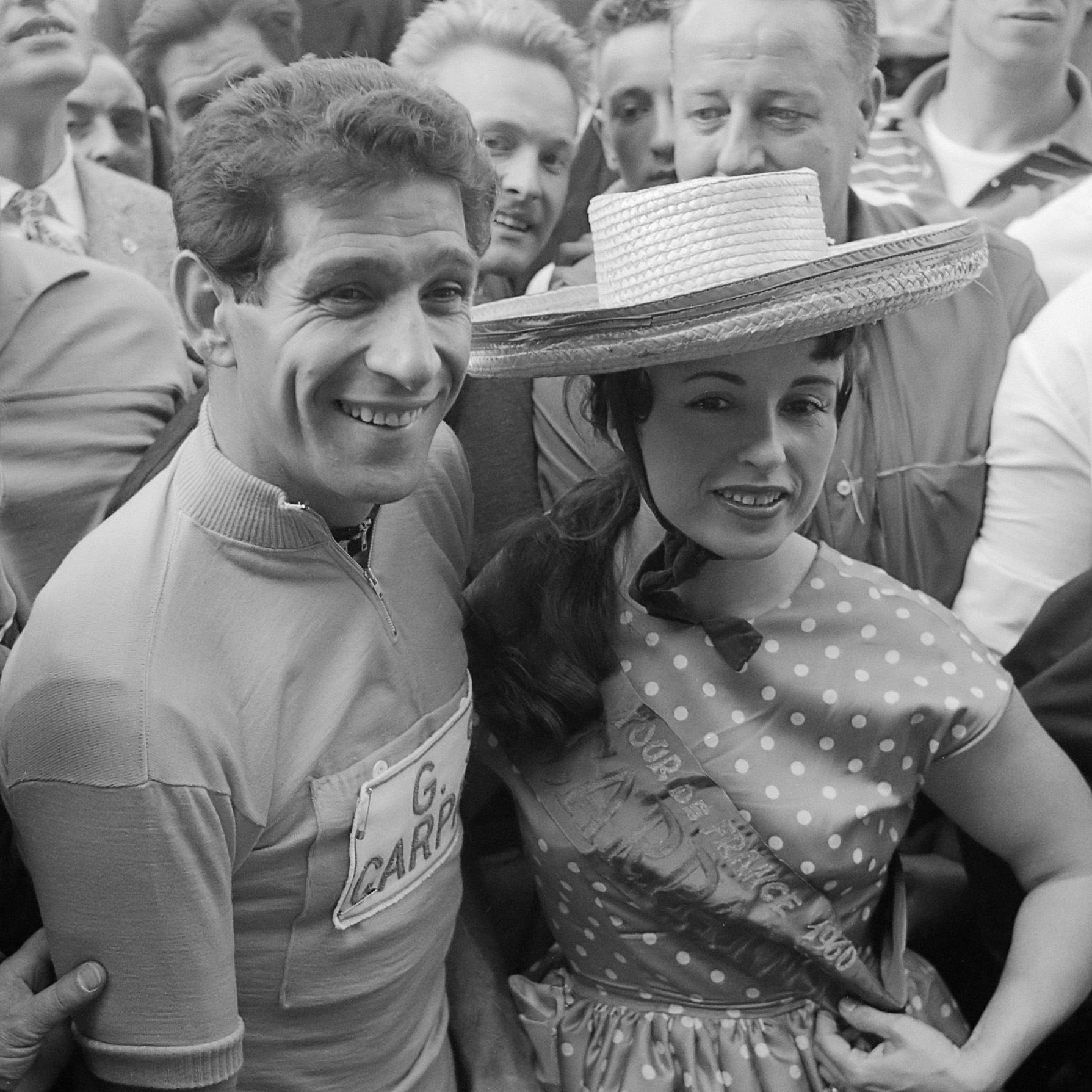 Tour de France, nl in gele trui 28 juni 1960